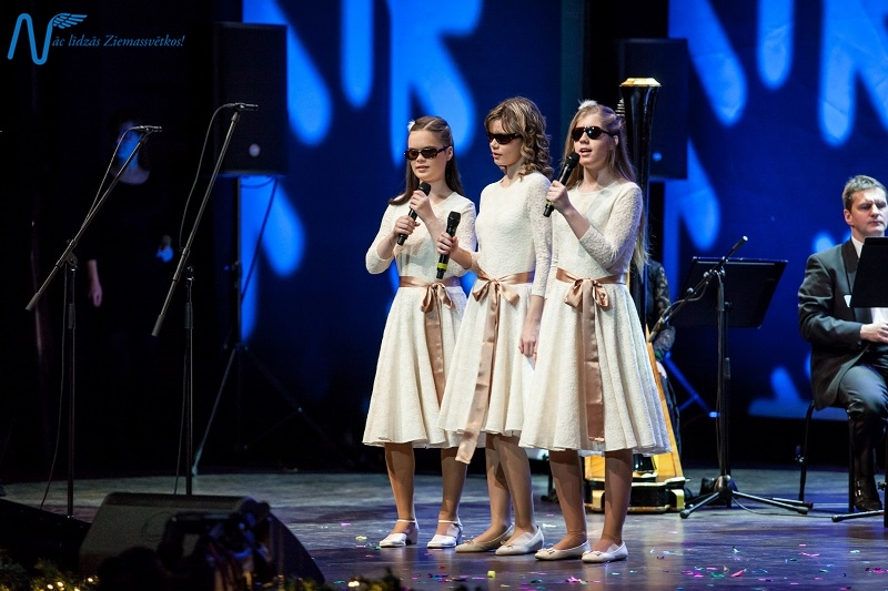 Fotomirklis no koncerta "Nāc līdzās Ziemassvētkos!" 2014. gadā